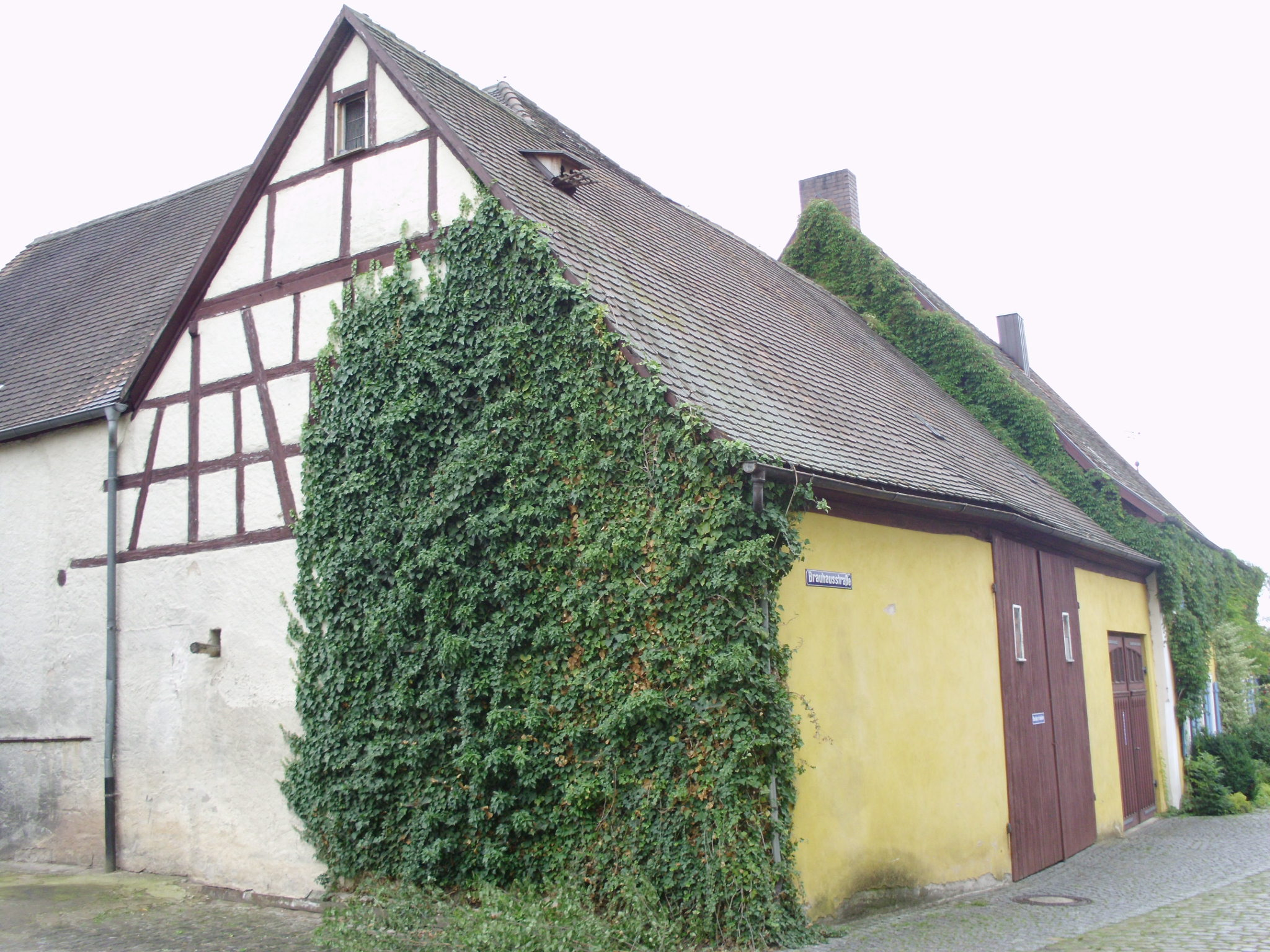 Merkendorf (Mittelfranken), Fachwerkscheune am Marktplatz